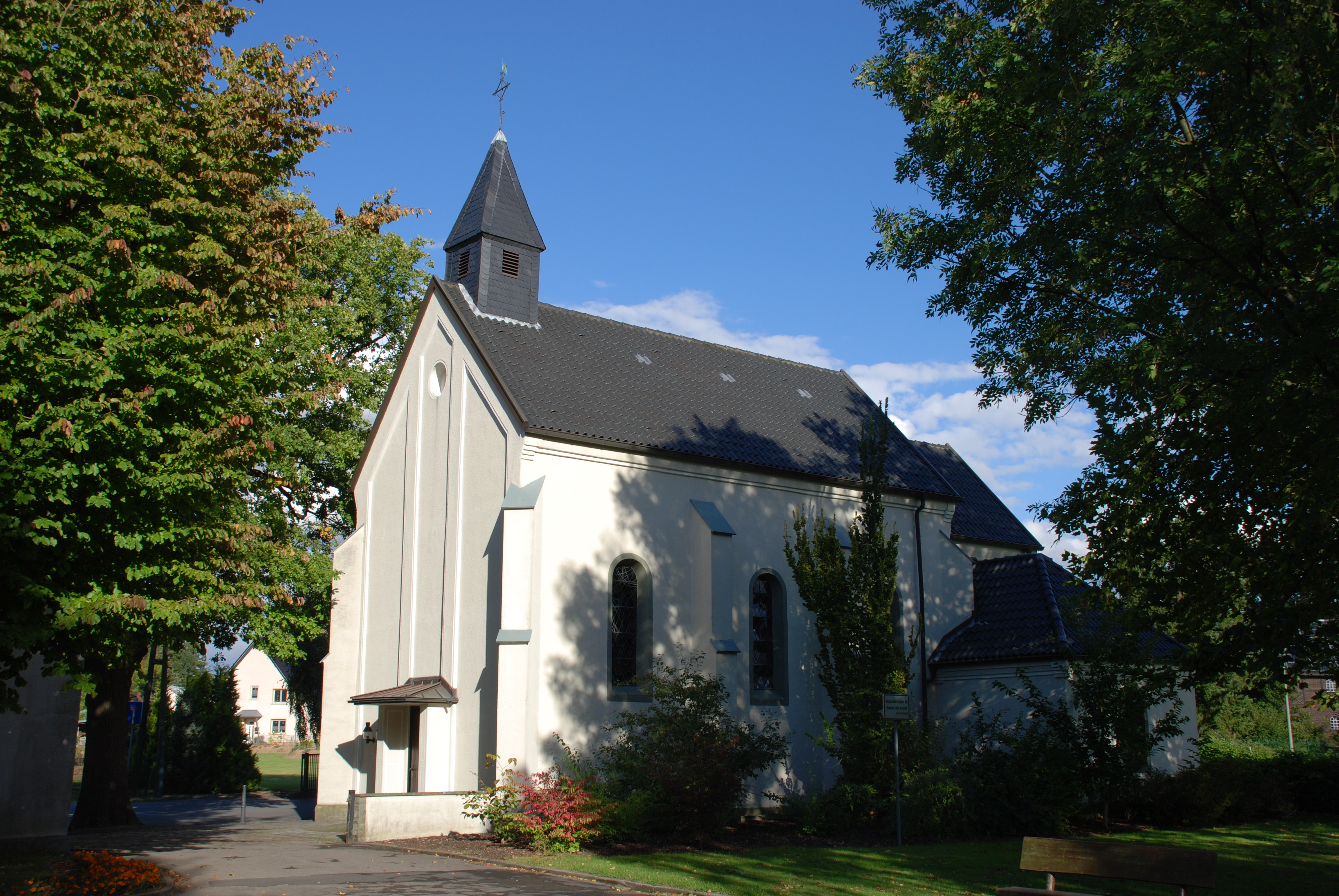 Die katholische Kapelle St. Maria-Magdalena ist ein denkmalgeschütztes Kirchengebäude in Niederbergstraße, einem Ortsteil von Werl, Kreis Soest, Nordrhein-Westfalen, Deutschland. This is a photograph of an architectural monument., no. 88